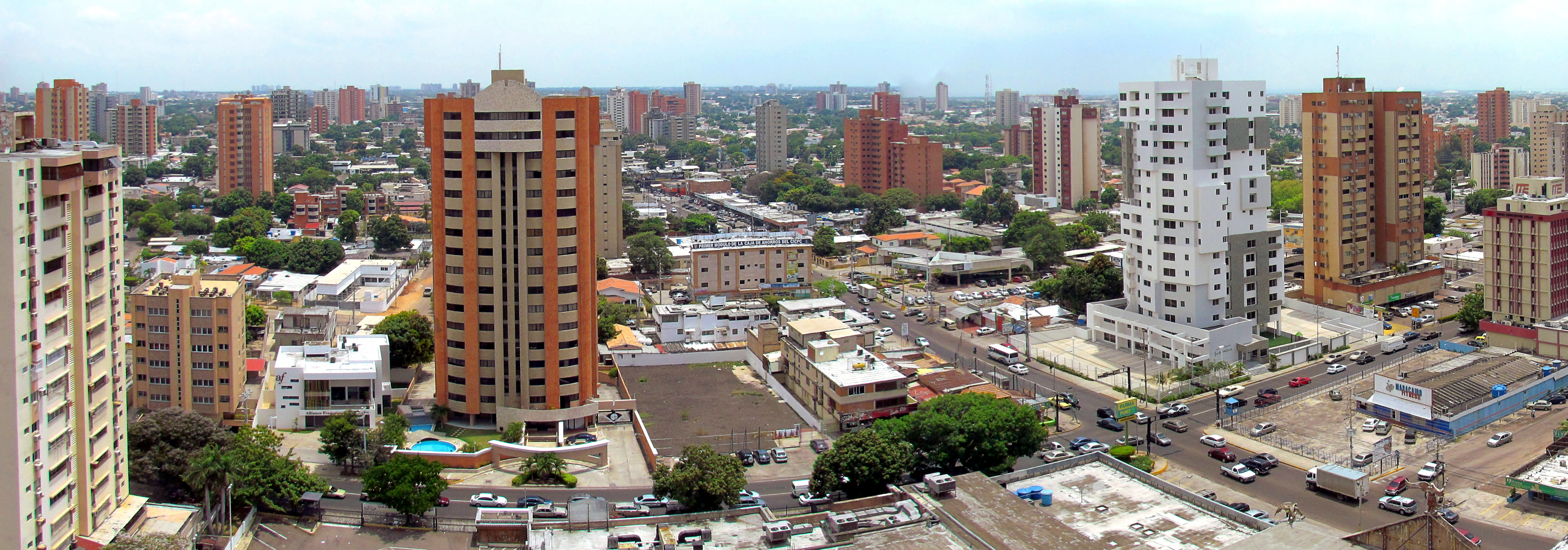 Avenida Cecilio Acosta, Ciudad de Maracaibo , Venezuela